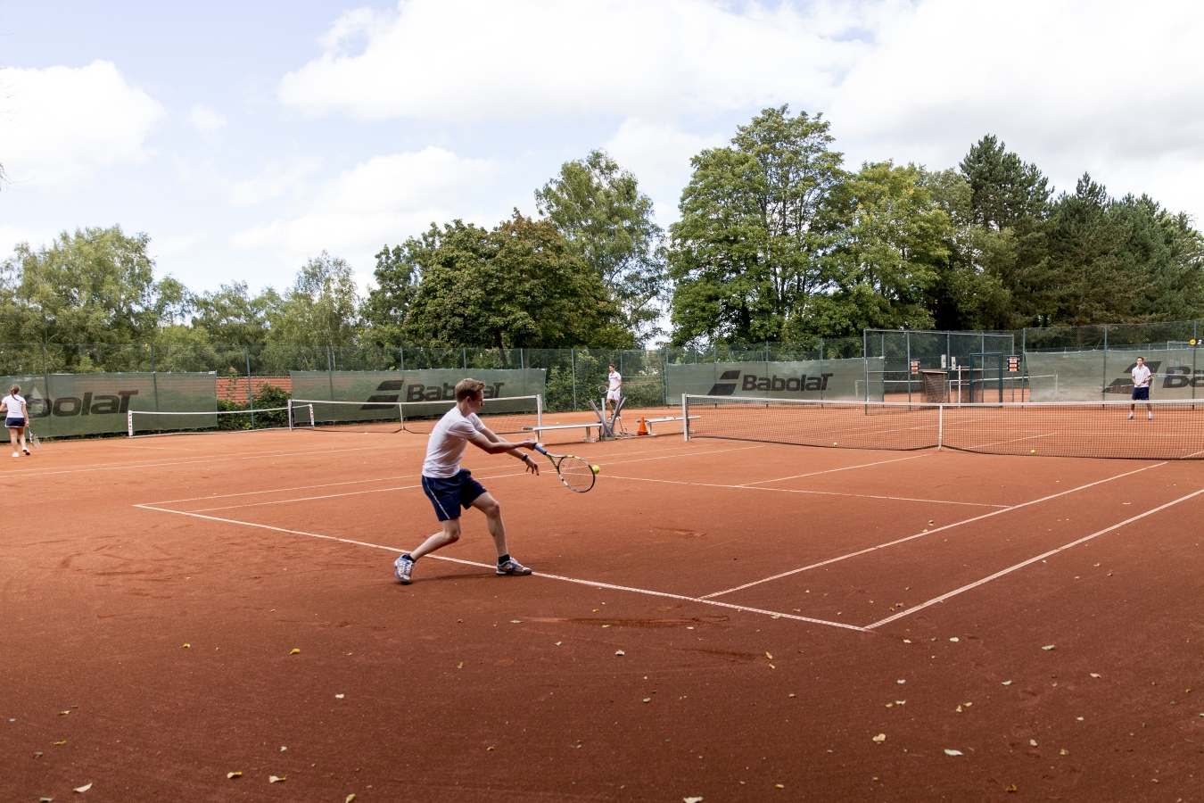 Blick auf den vorderen Tennisplatz des Aloisiuskollegs Bonn (2015)